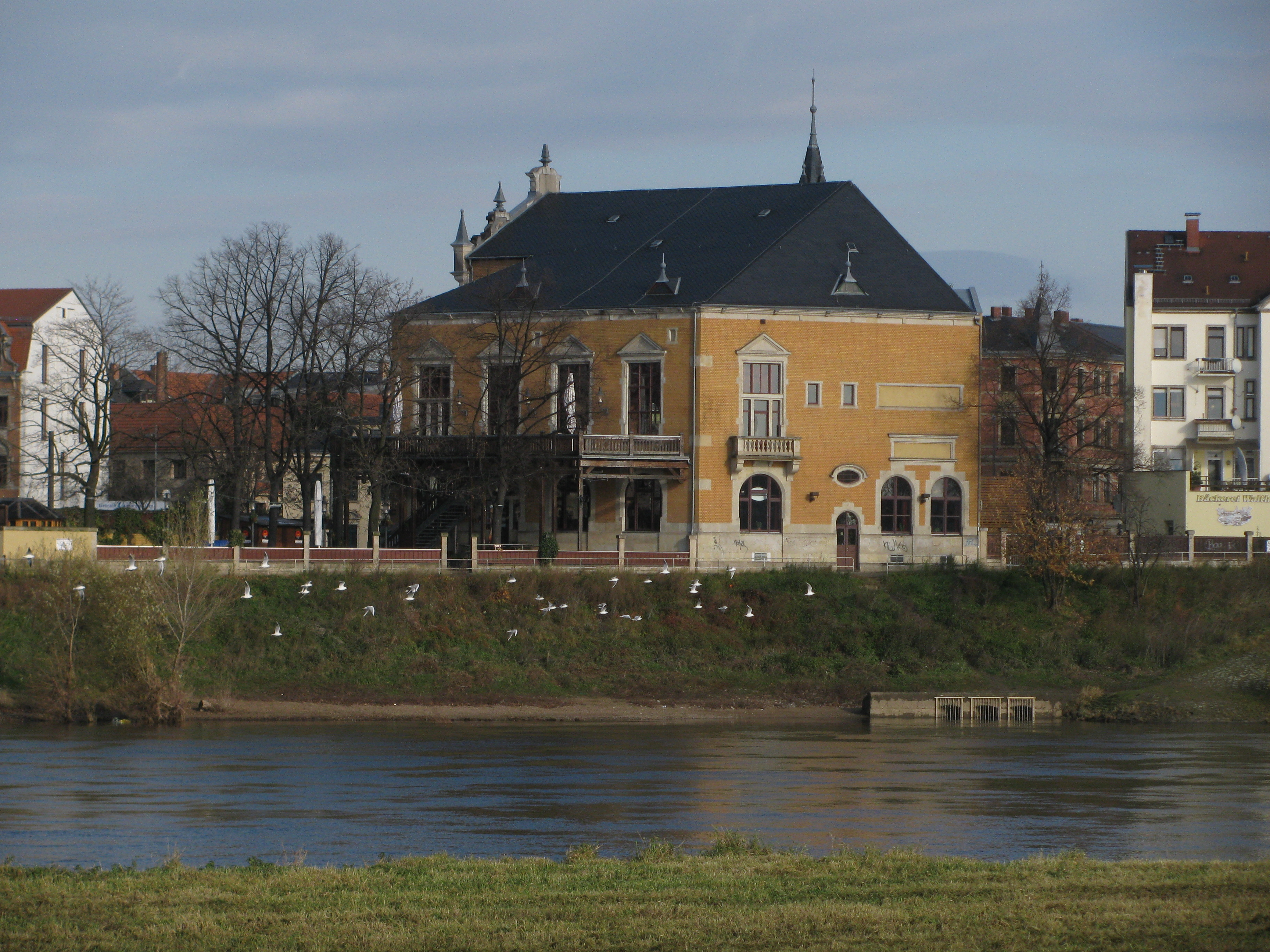 Ballhaus Watzke in Dresden-Mickten, von der anderen Elbseite gesehen